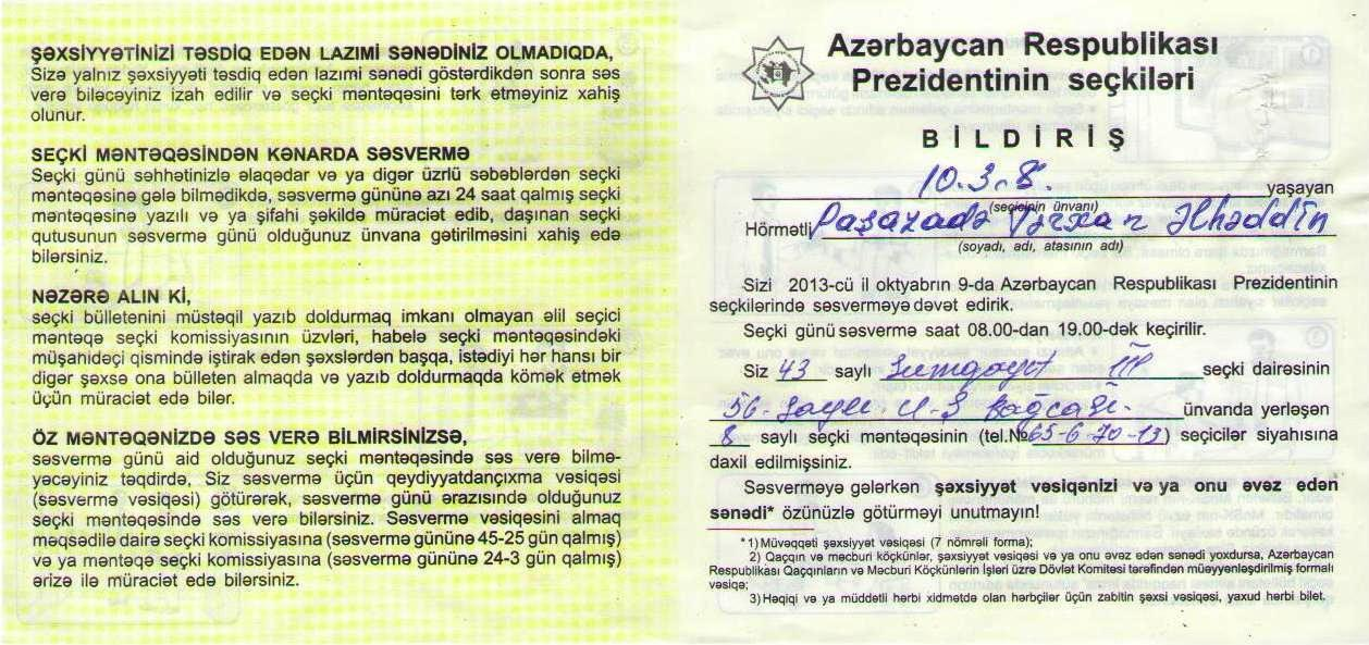 2013-cü il Azərbaycan Respublikası prezidenti seçkilərində paylanmış seçici bildirişi